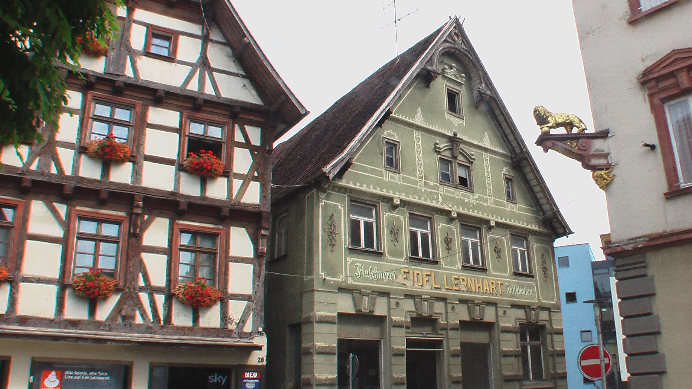 Meßkirch Fachwerk 2010